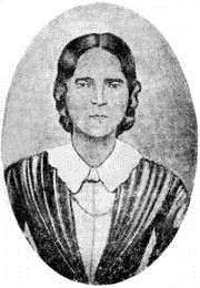 XIX century portrait of Dominga Ortiz de Páez.